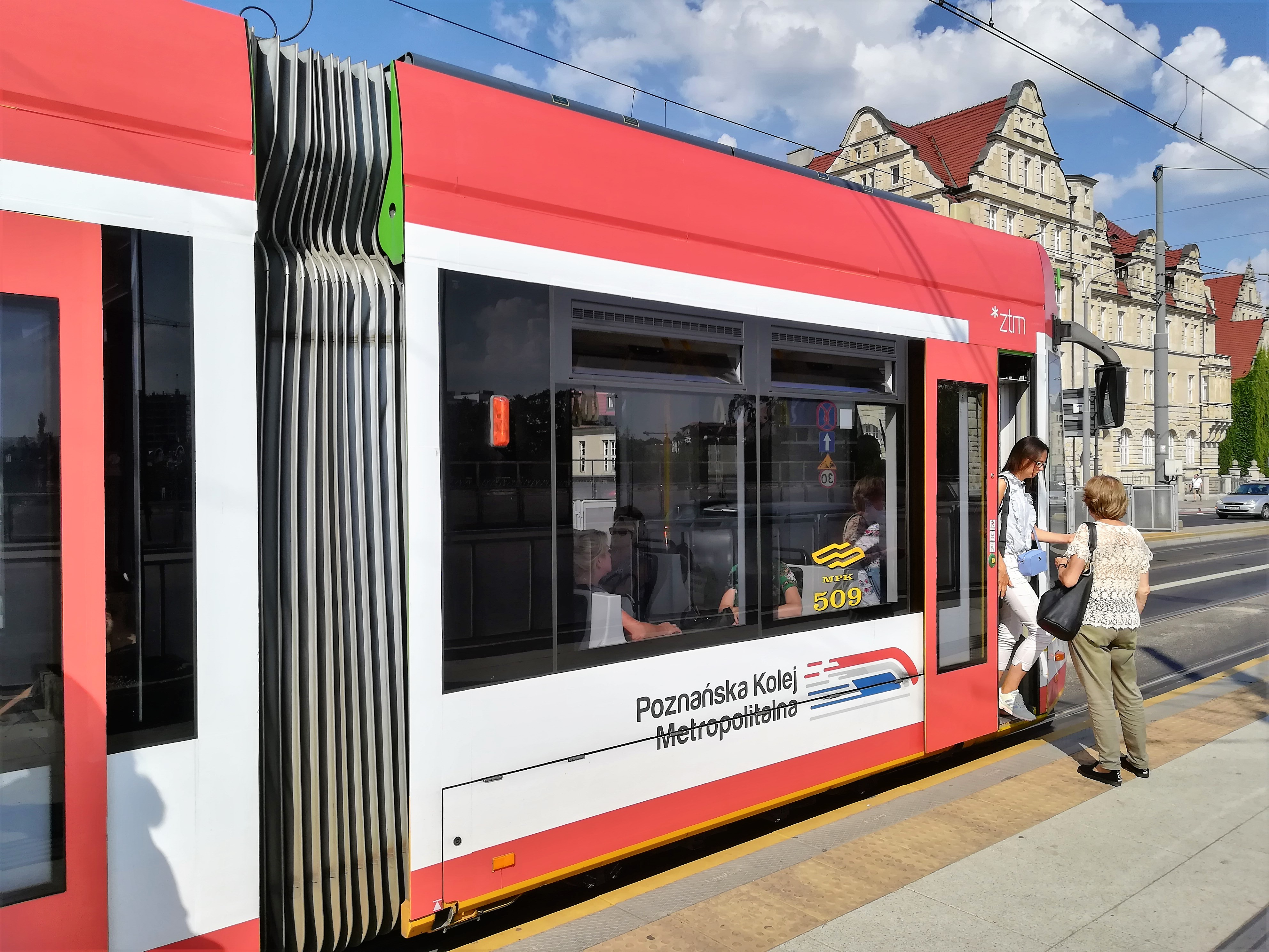 Poznańska Kolej Metropolitalna - reklama na tramwaju w Poznaniu.